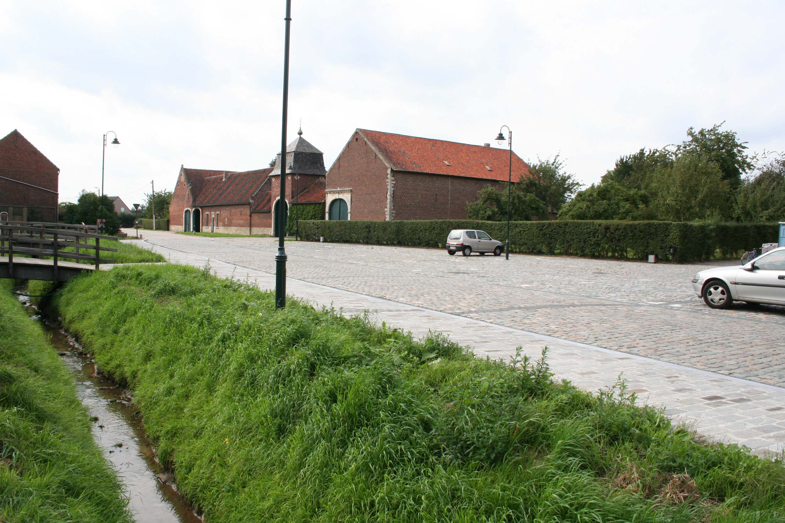 Opvelp